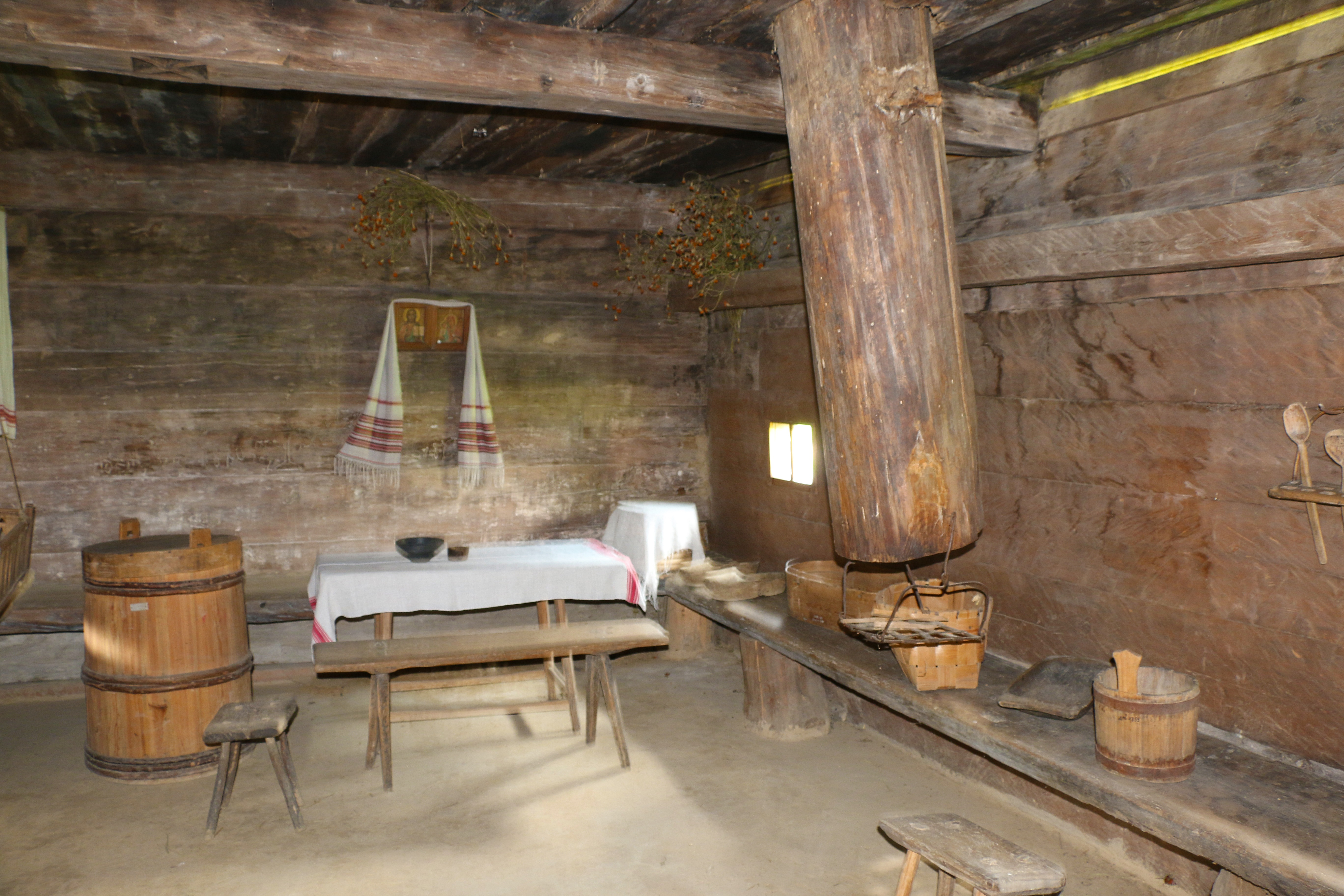 Садиба з Волинського Полісся, Київ, Пирогів